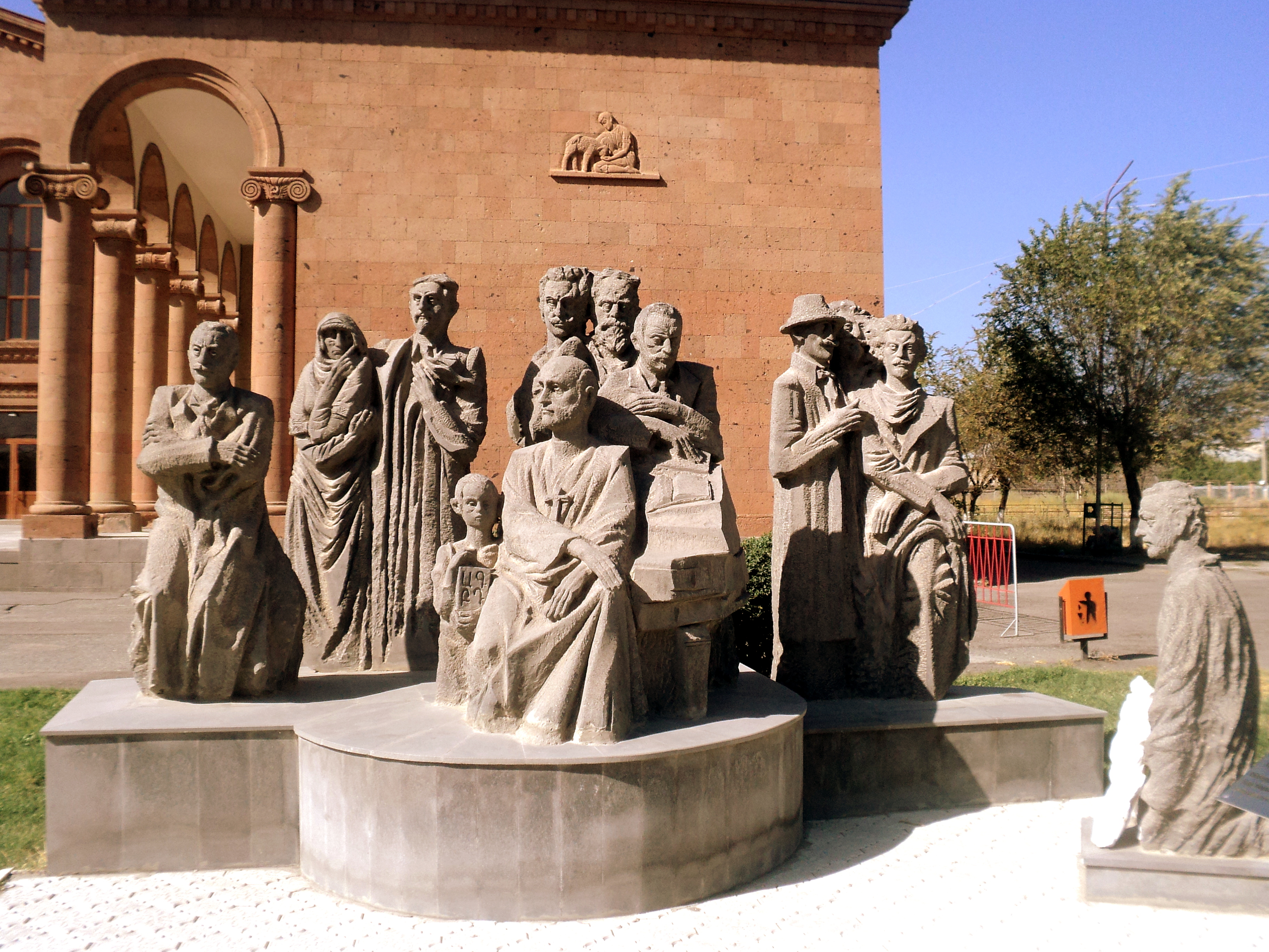 Քանդակագործ` Լևոն Թոքմաջյան, 2011, գտնվում է Էջմիածնում